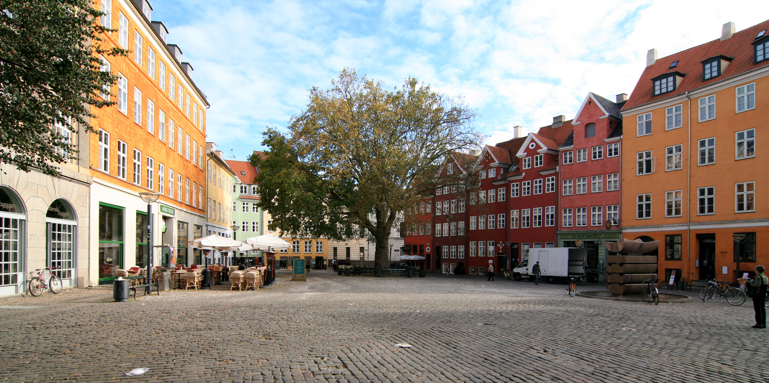 Gråbrødretorv, København.